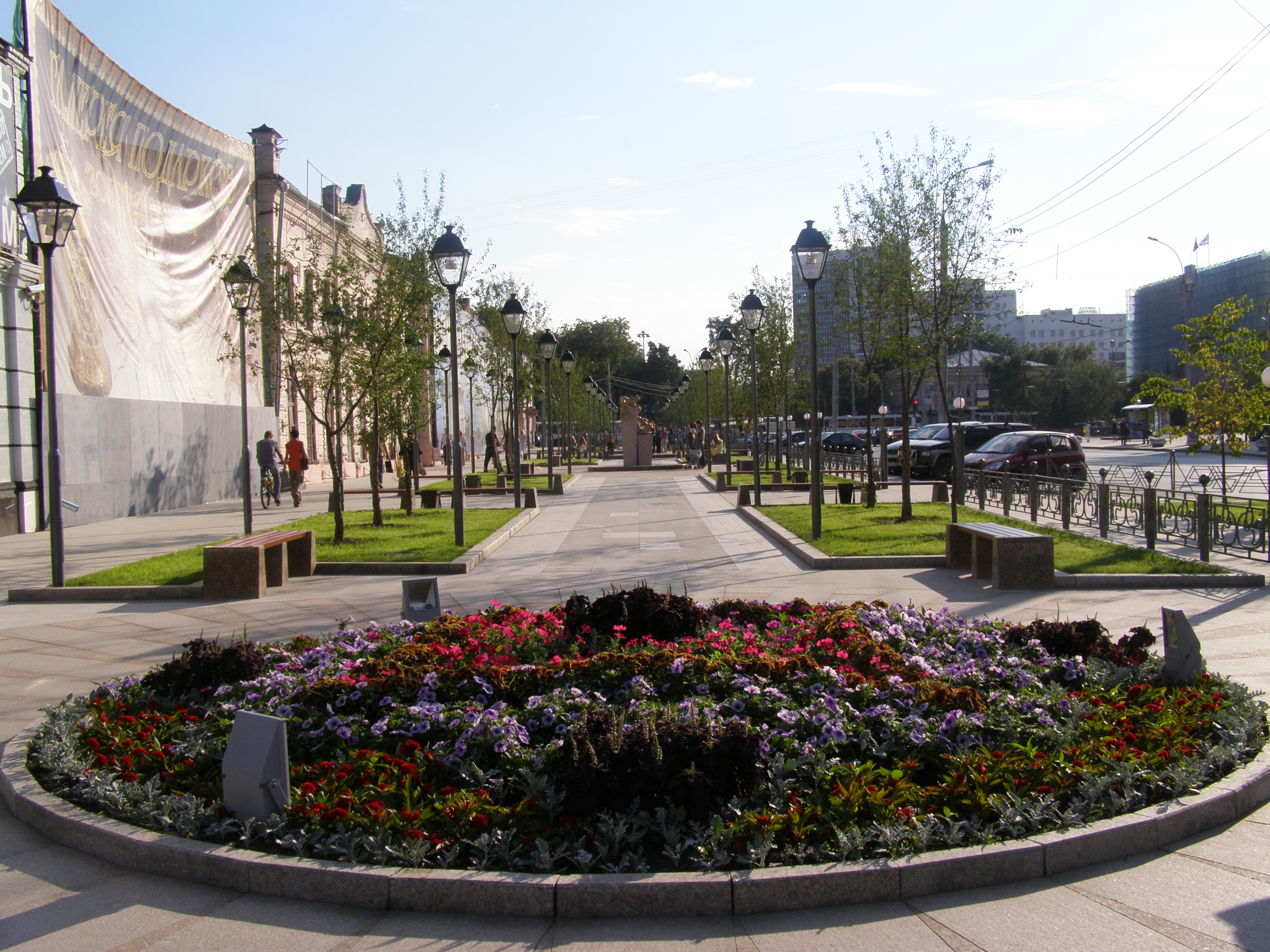 Skvaro de siberiaj katoj. Tjumeno, Rusio.